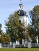 Lockne kyrka, sommaren 2008